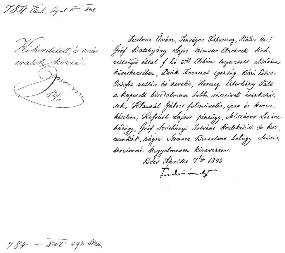 A Batthyány-kormány kinevezése (V. Ferdinánd levele István nádorhoz)